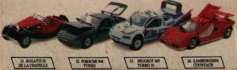 Rango 1:24 de "Los SuperAutos COPEC"